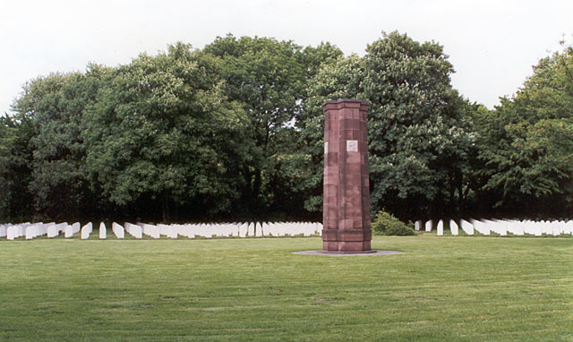 Ereveld Dusseldorf